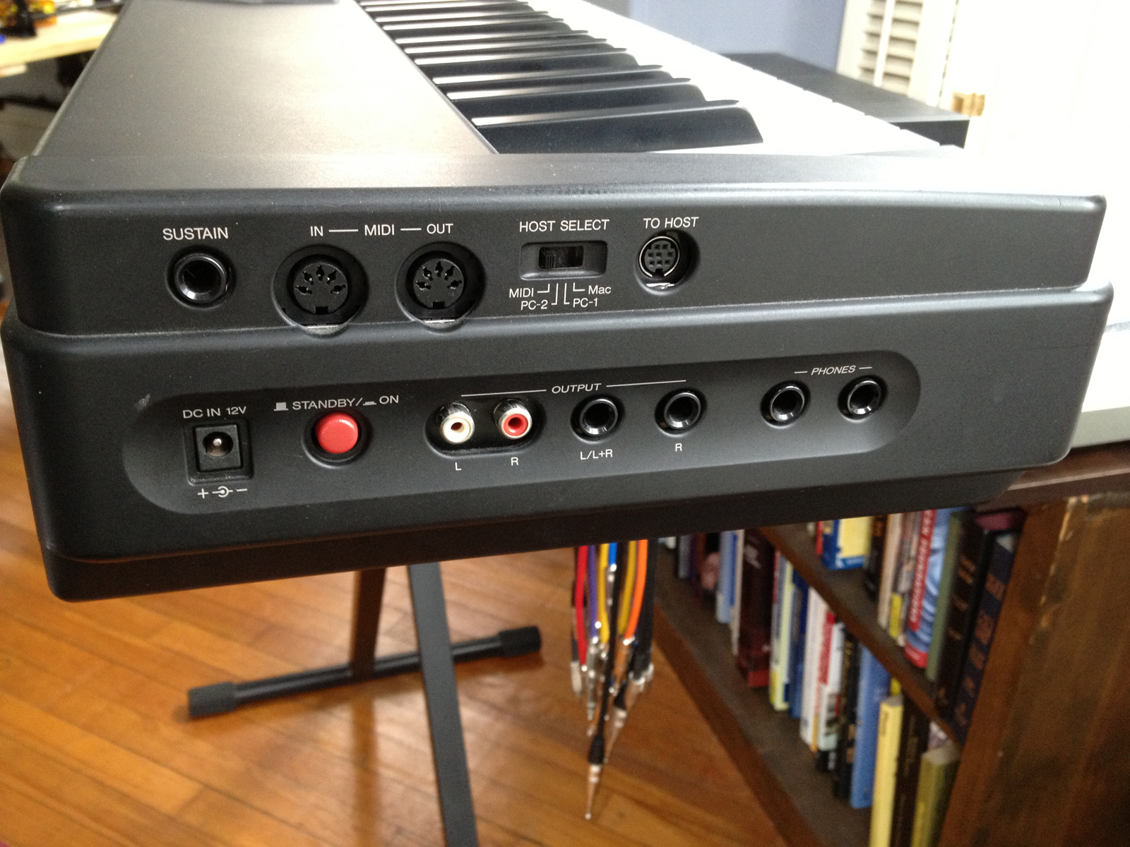 Yamaha P80 Digital Piano - connector panel